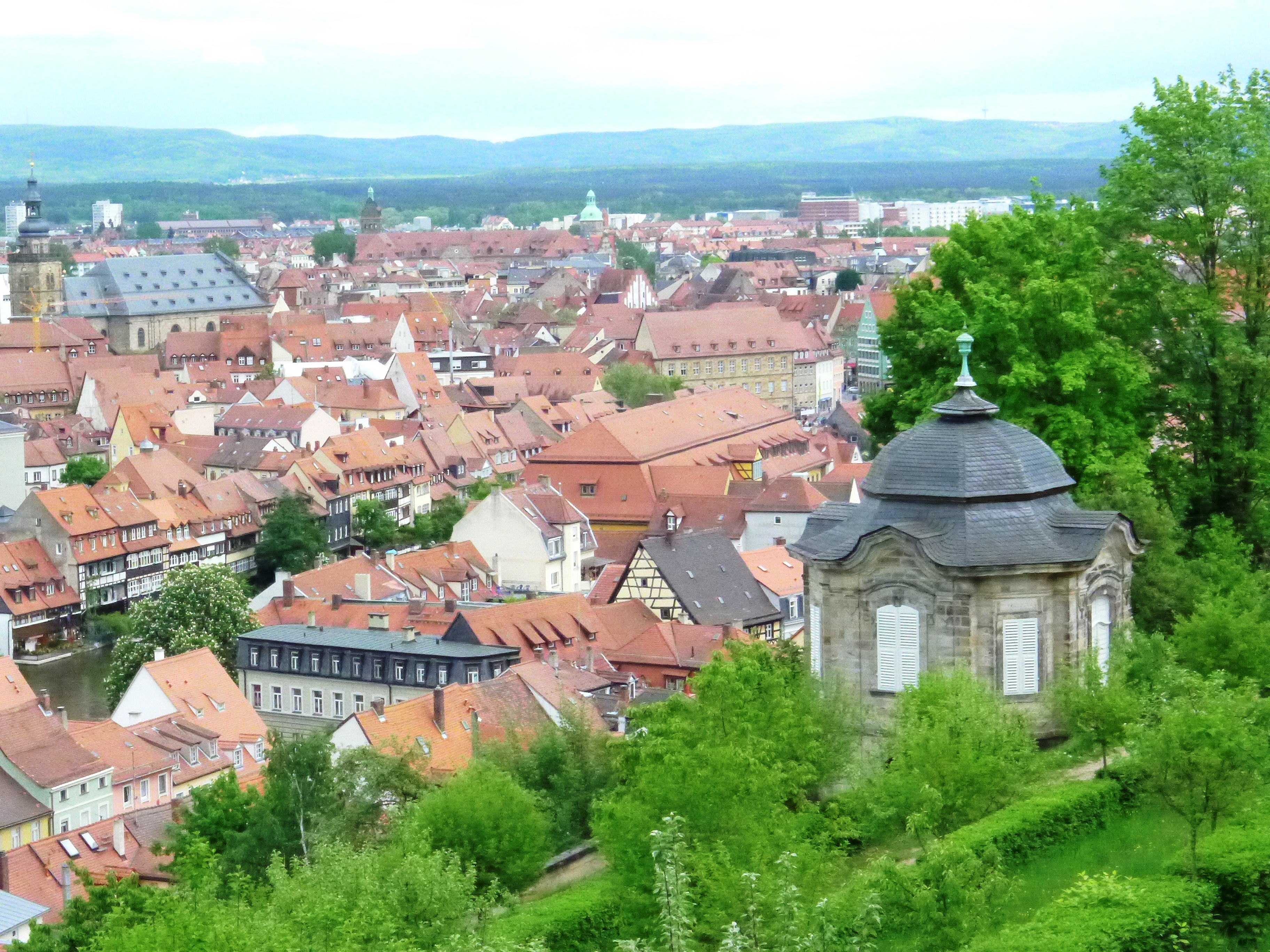 Blick vom Michaelsberg auf die Stadt